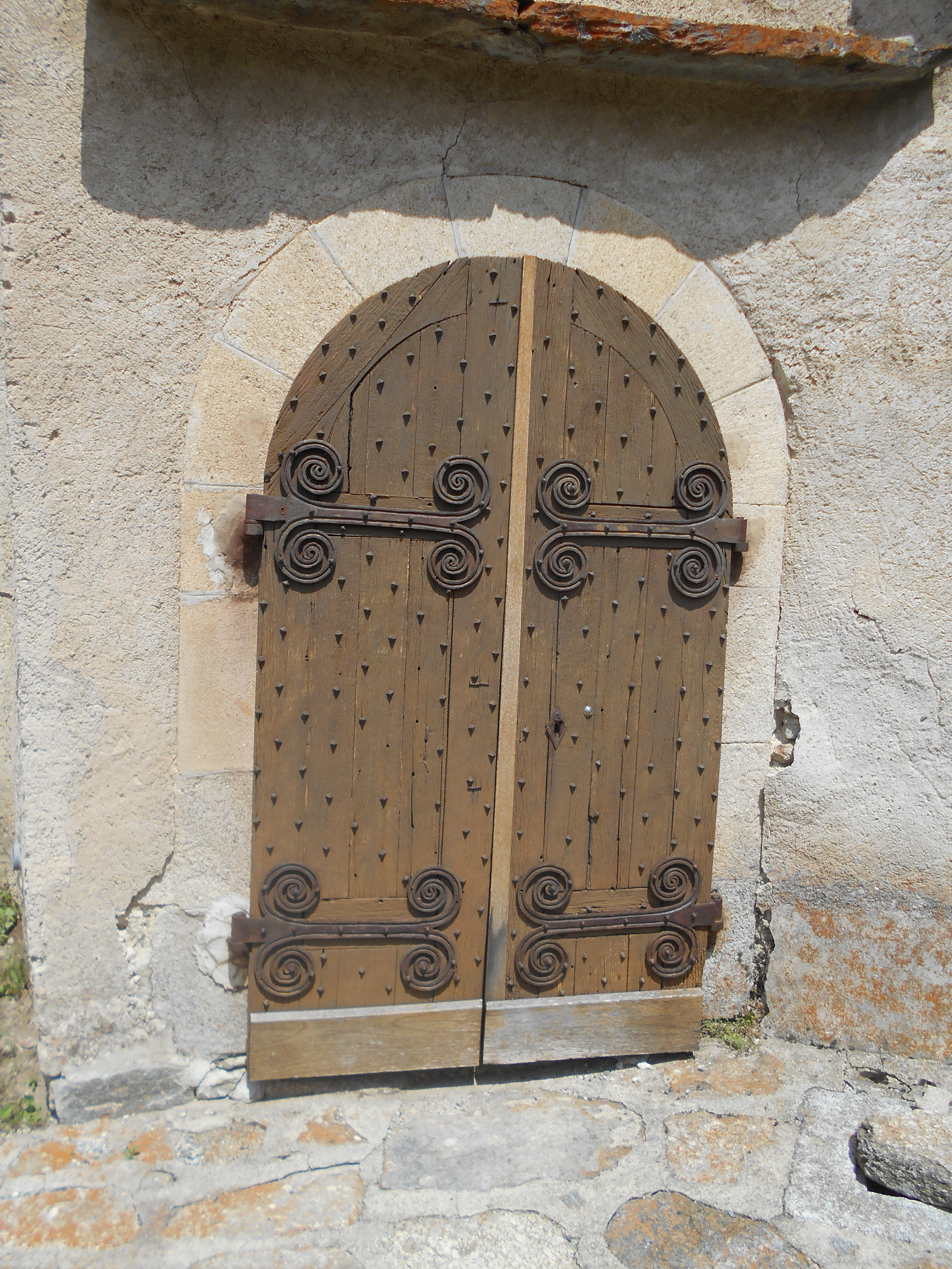 Ferramenta romànica de Santa Maria de Planès, al Conflent.